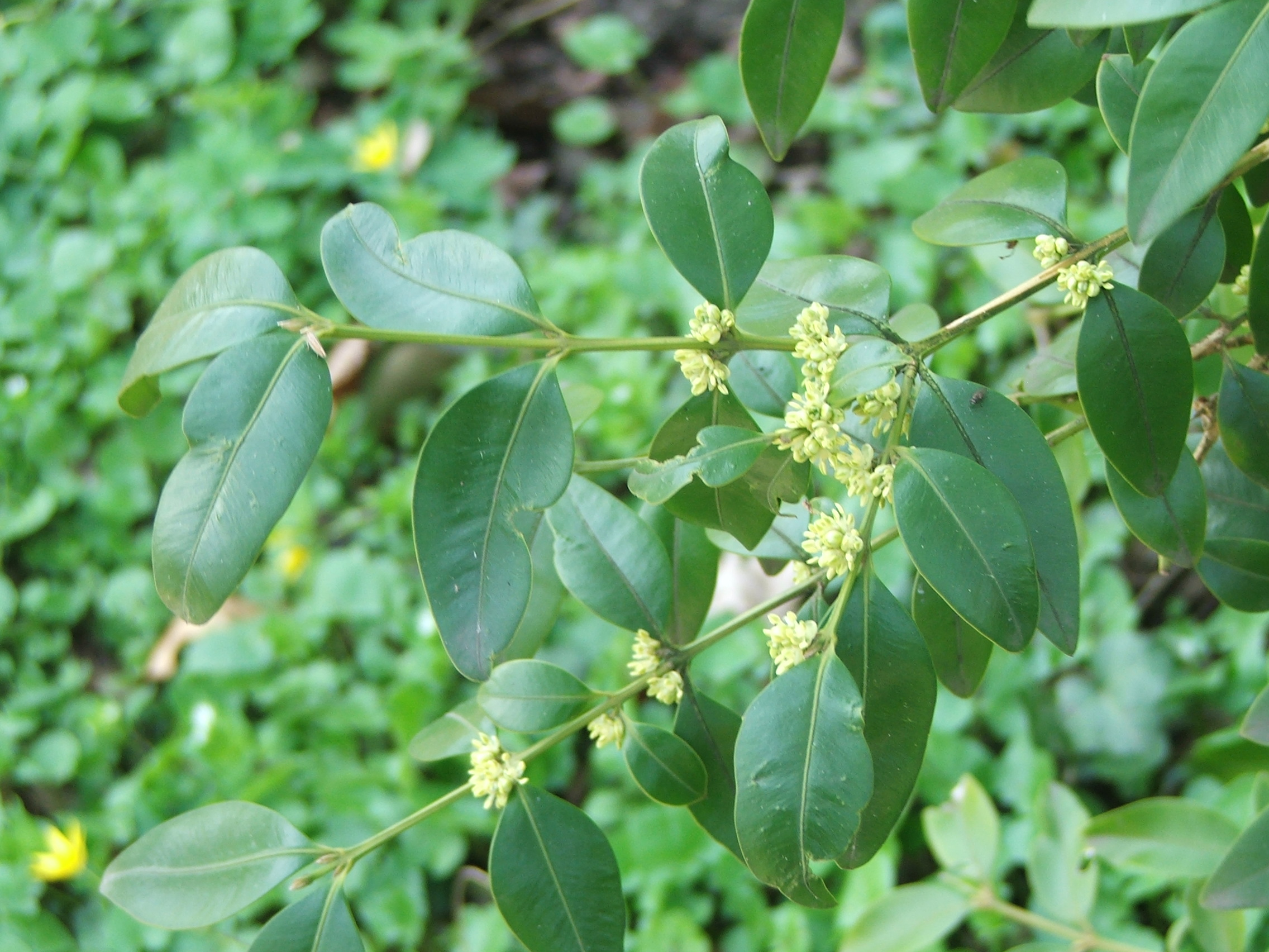 Buxus henryi - MTA Botanic Garden, Hungary